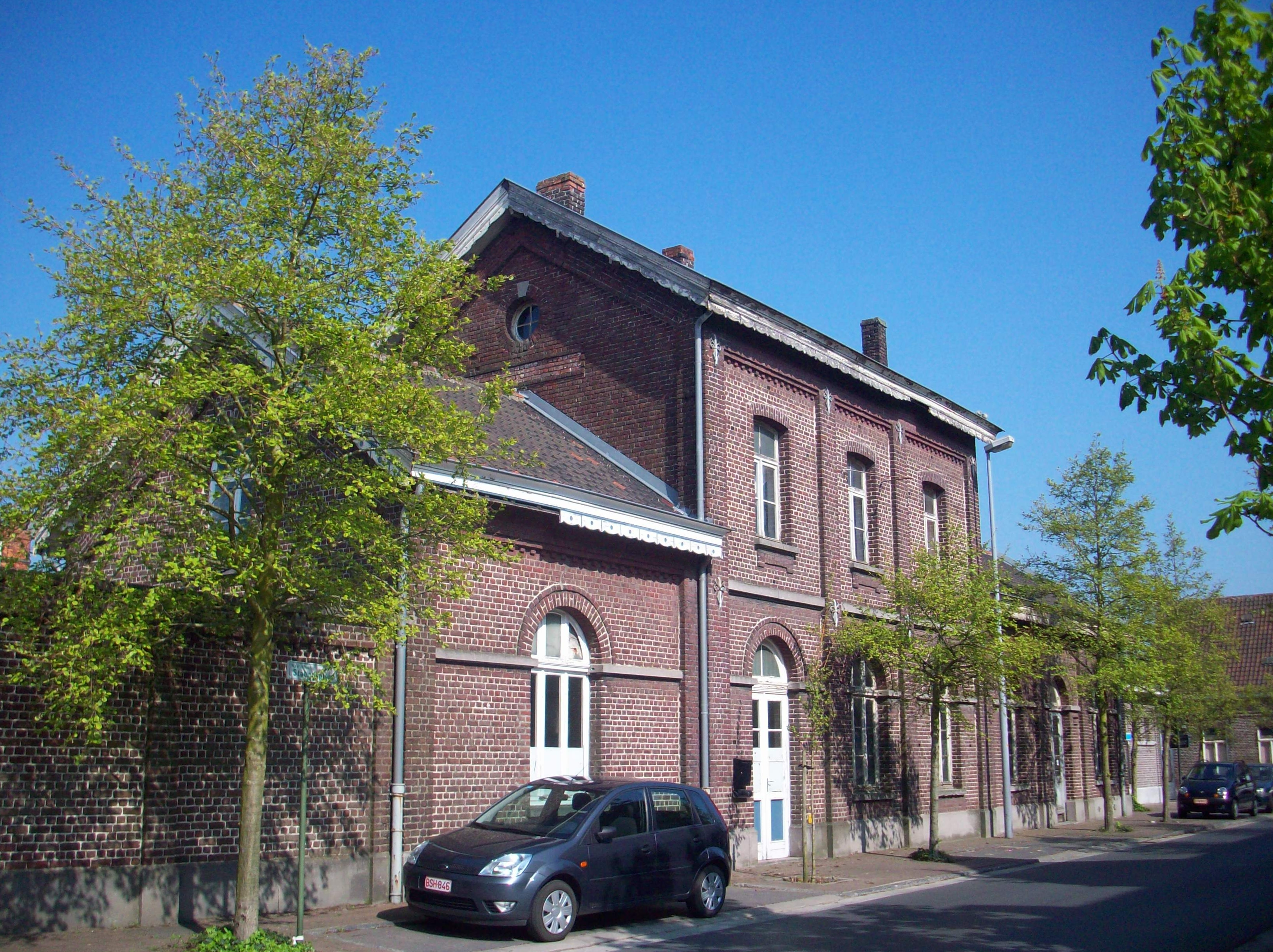 Foto van Station Waarschoot